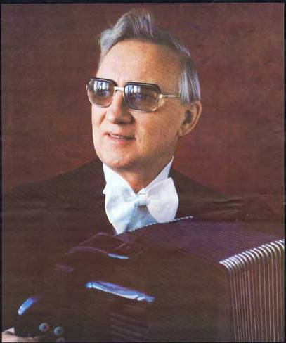 Народный артист СССР Юрий Иванович Казаков.